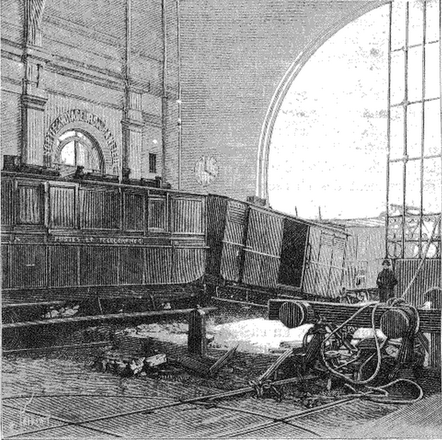 Vue de l'intèrieur de la gare après l'accident de la gare Montparnasse